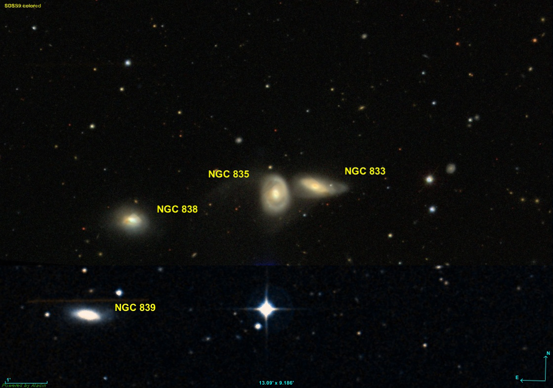 Image créée à l'aide du logiciel Aladin Sky Atlas du Centre de Données astronomiques de Strasbourg et des données fusionnées de DSS (Digitized Sky Survey) et de SDSS (Sloan Digital Sky Survey)